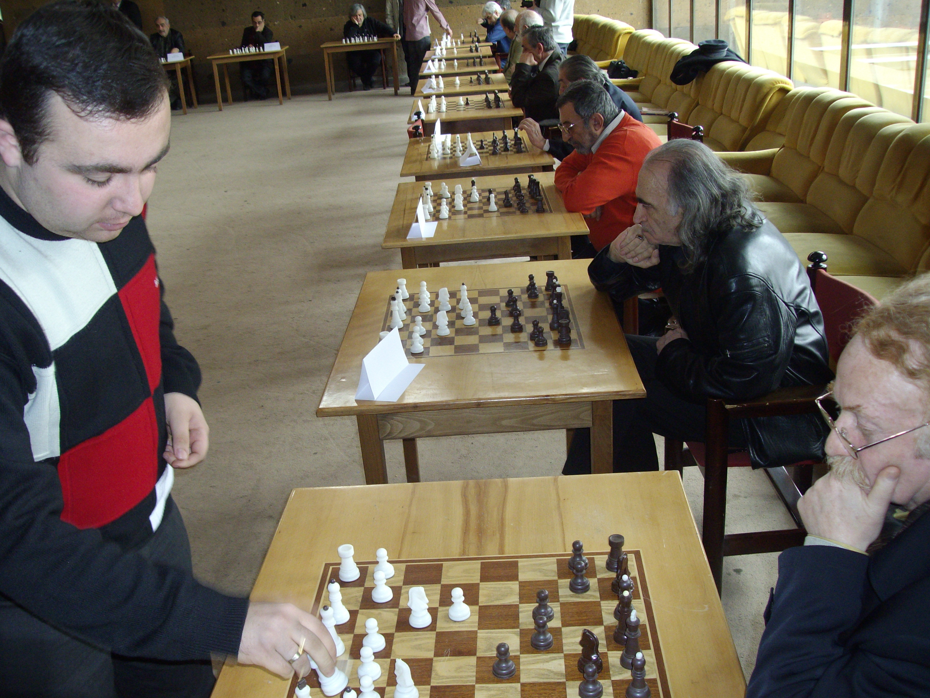 Շախմատի մրցաշար